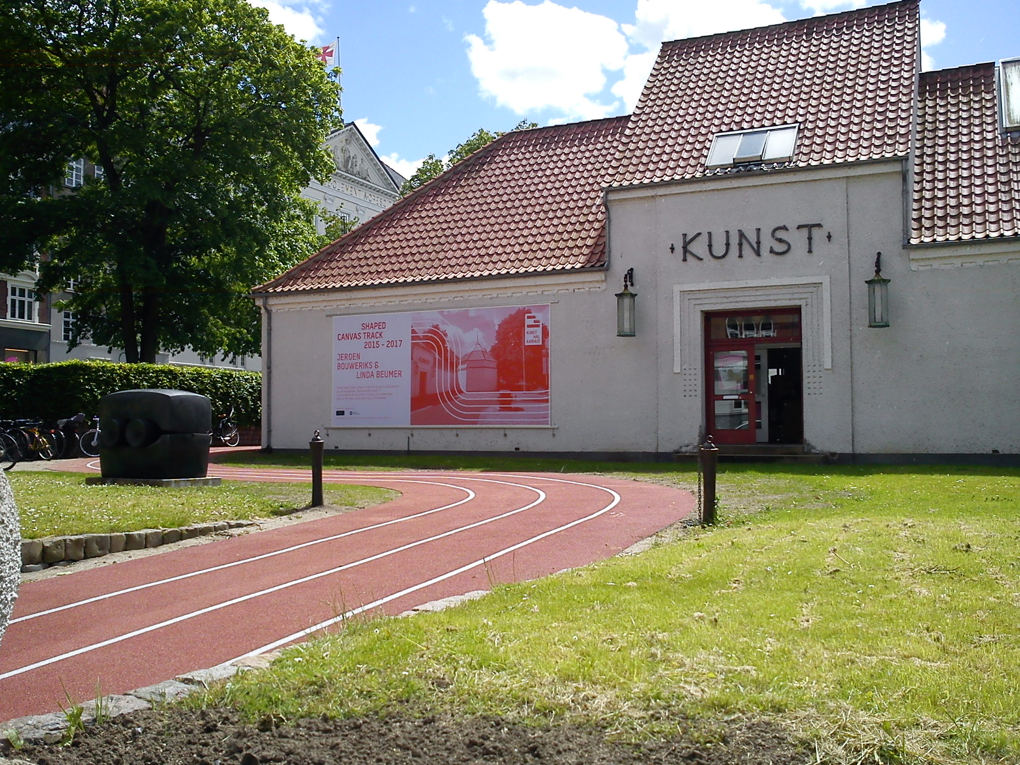 Kunsthal Aarhus. Stien til indgangen på den anden side fik nyt design i maj 2015. Tv. Willy Ørskovs skulptur "Sort granit fra Congo", udført 1977.